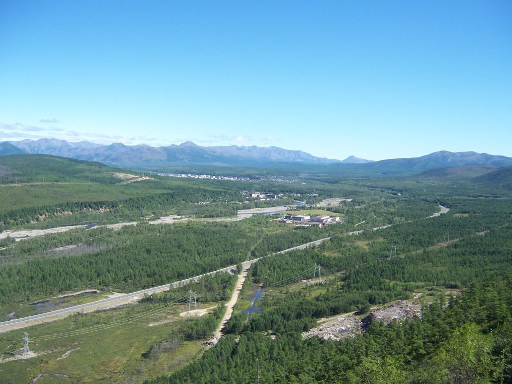 Долина Хасына близ посёлков Хасын, Палатка